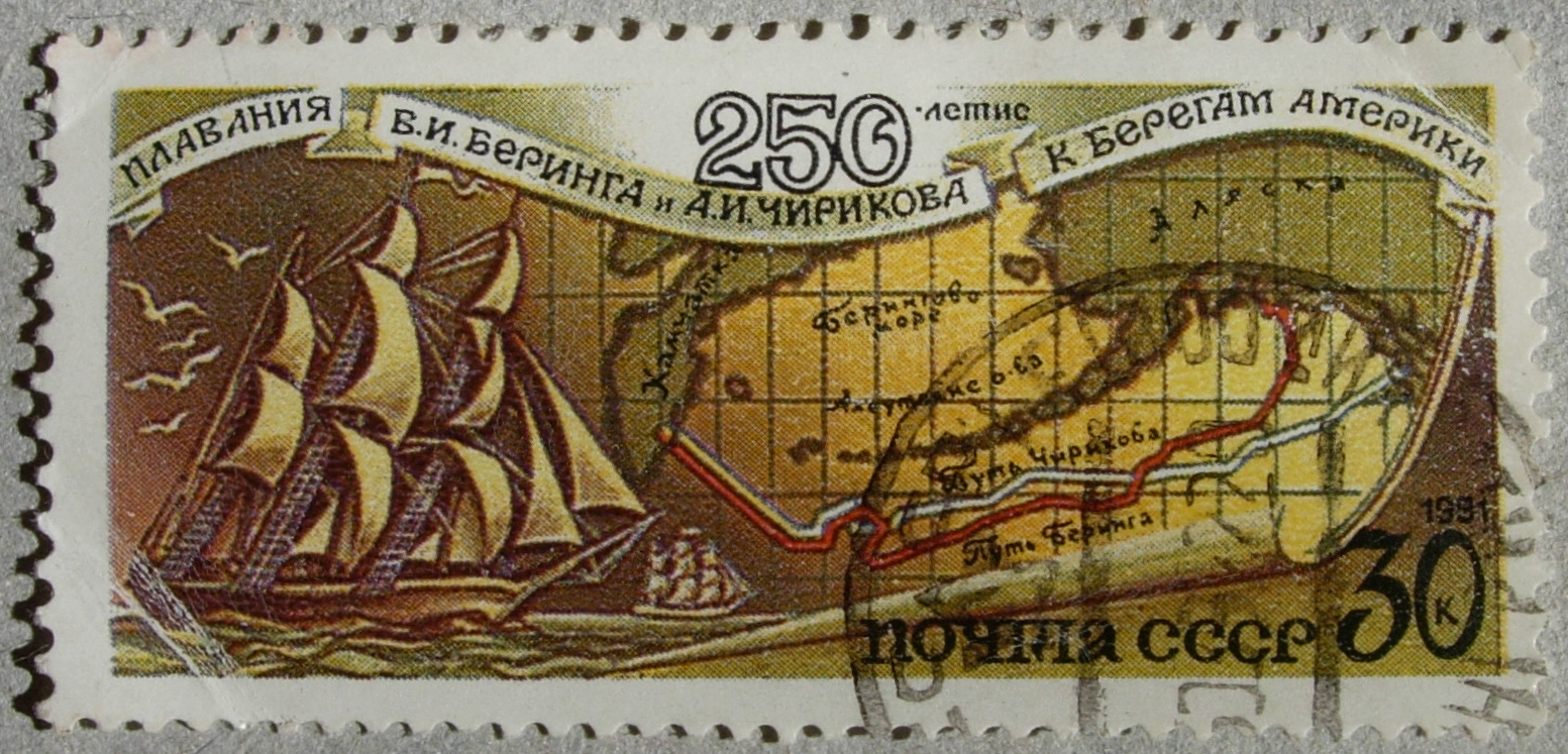 Марка Почты СССР, посвященная 250-летию плавания В.И.Беринга и А.И.Чирикова к берегам Америки. 1991 год.